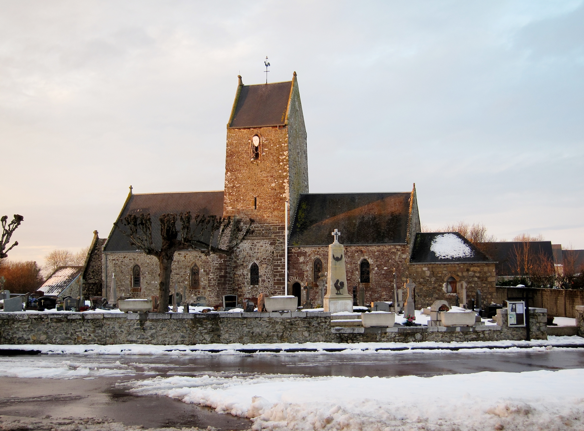 L'église de Saint-Malo-de-la-Lande (Manche).